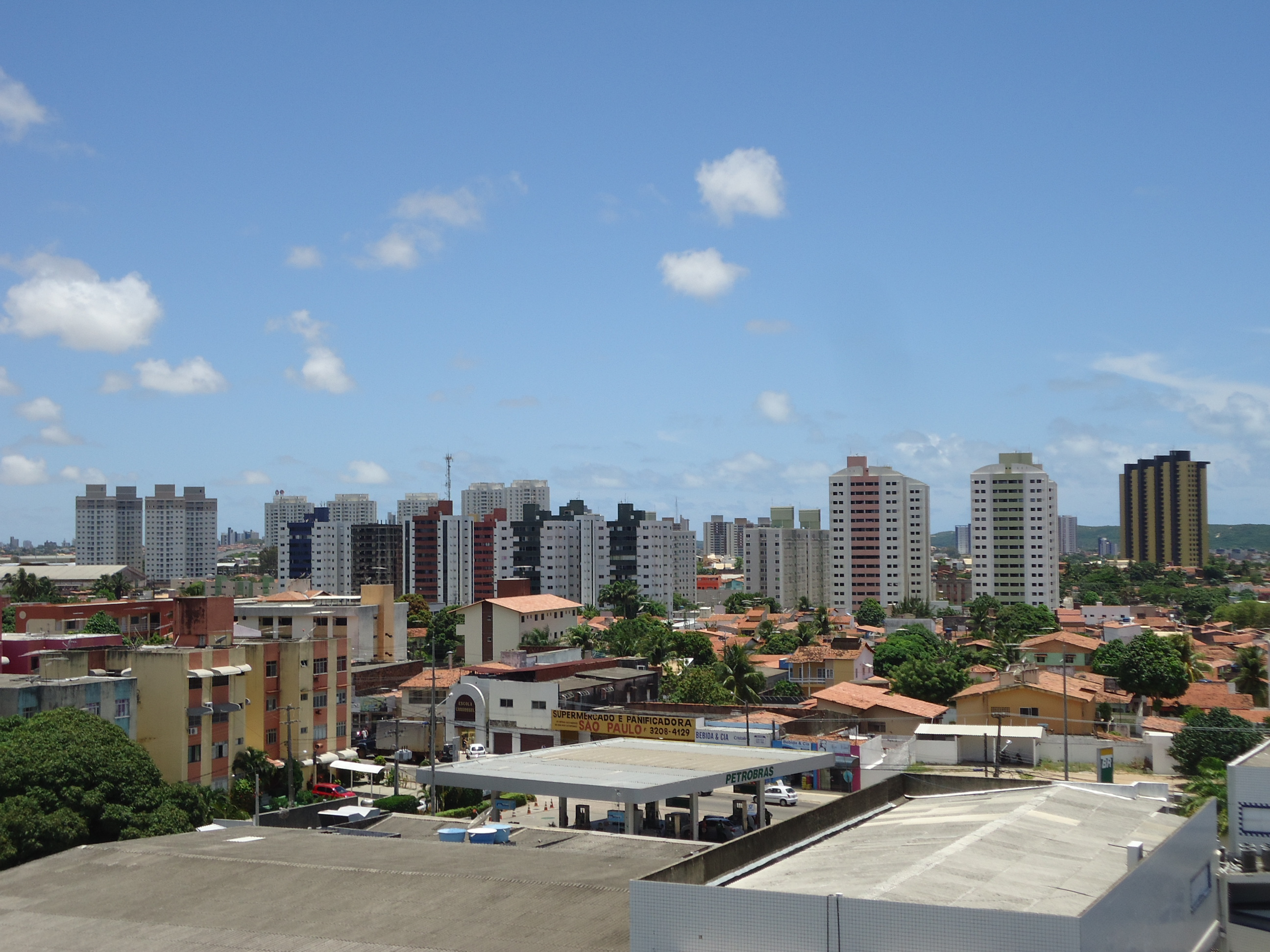 Panorama de Parnamirim RN, Brasil.